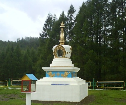 Цаган-Моринский субурган